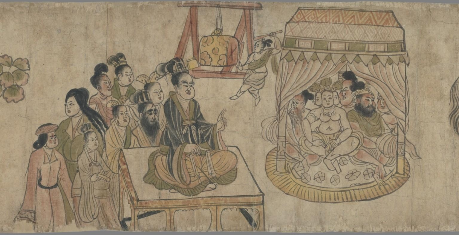 Partie du Rouleau illustré du combat magique entre Śariputra et Raudrakṣa. Voir [1]